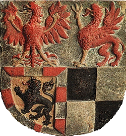 Das markgräfliche Wappen Friedrich I. von Brandenburg. Linksunten das burggräfliche Wappen, daneben das Stammwappen der Hohenzollern, die Zollernvierung. Linksoben, der märkische Adler und daneben der pommersche Greif